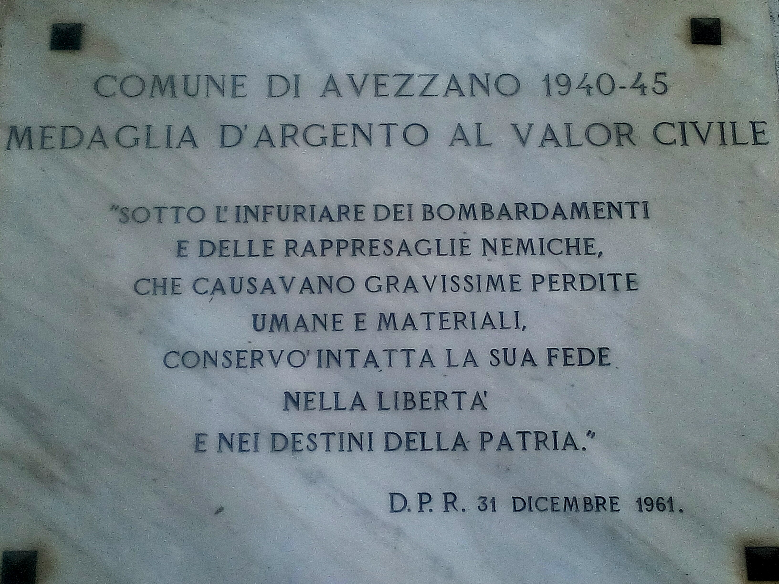 Targa ricordo posta nel palazzo municipale di Avezzano